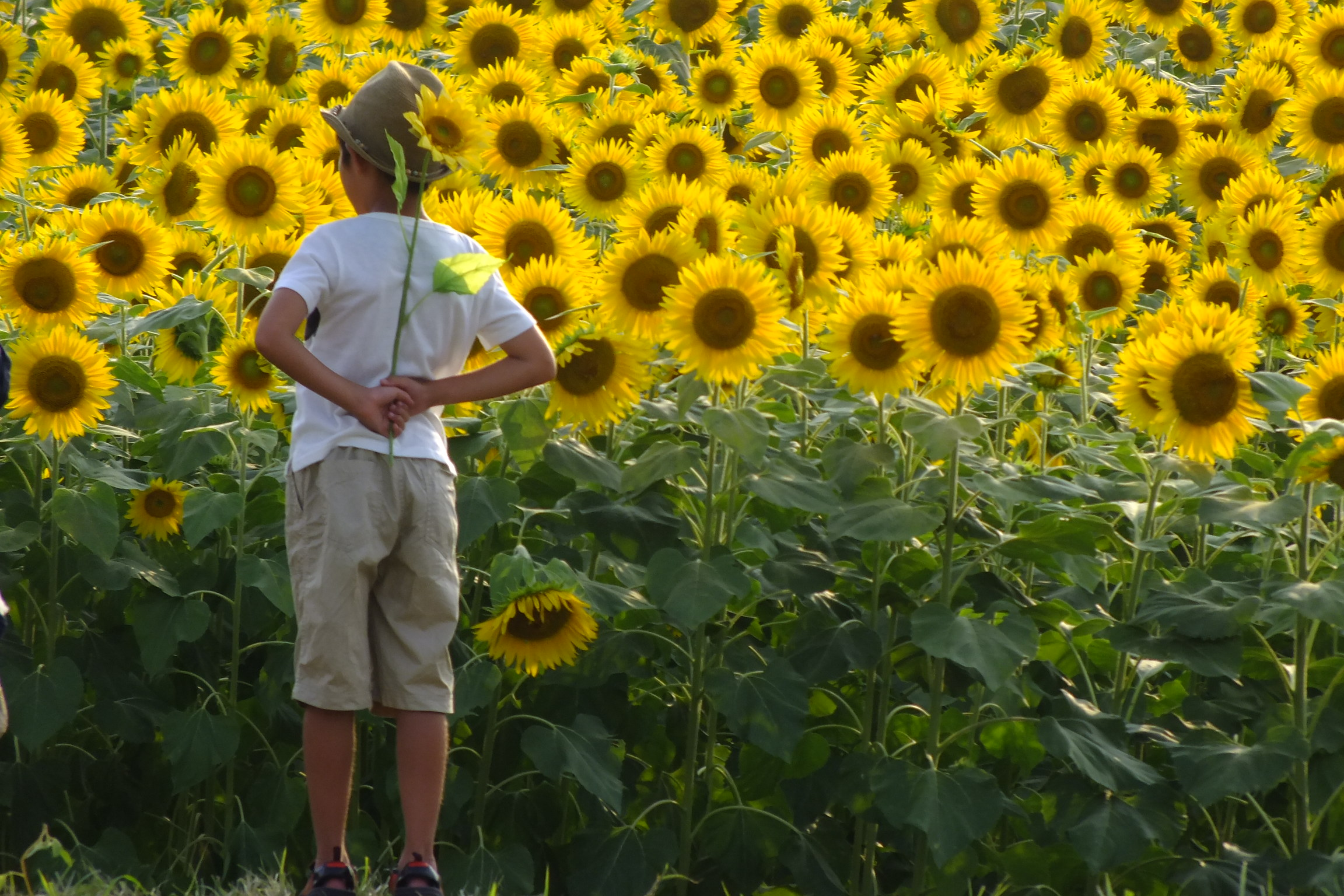 2017-07-15 Ono-himawarino-oka-park (小野市立ひまわりの丘公園)